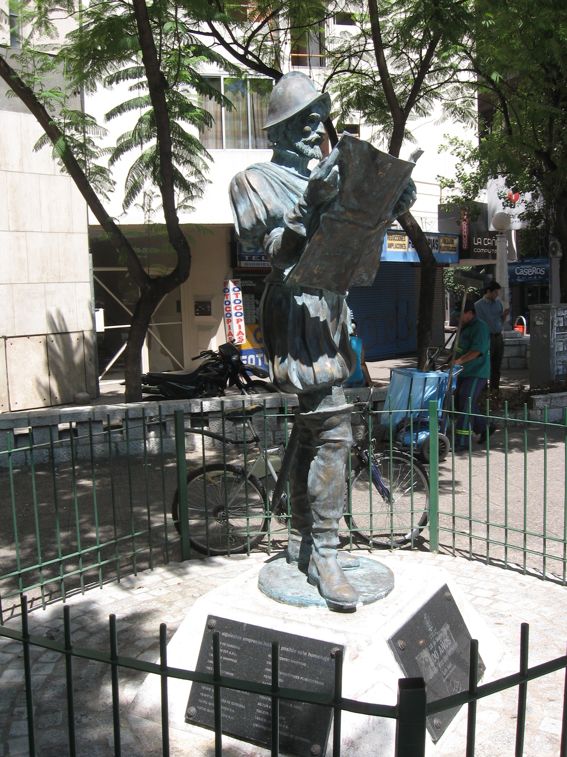 Estatua del virrey Rafael de Sobremonte, en la ciudad de Córdoba